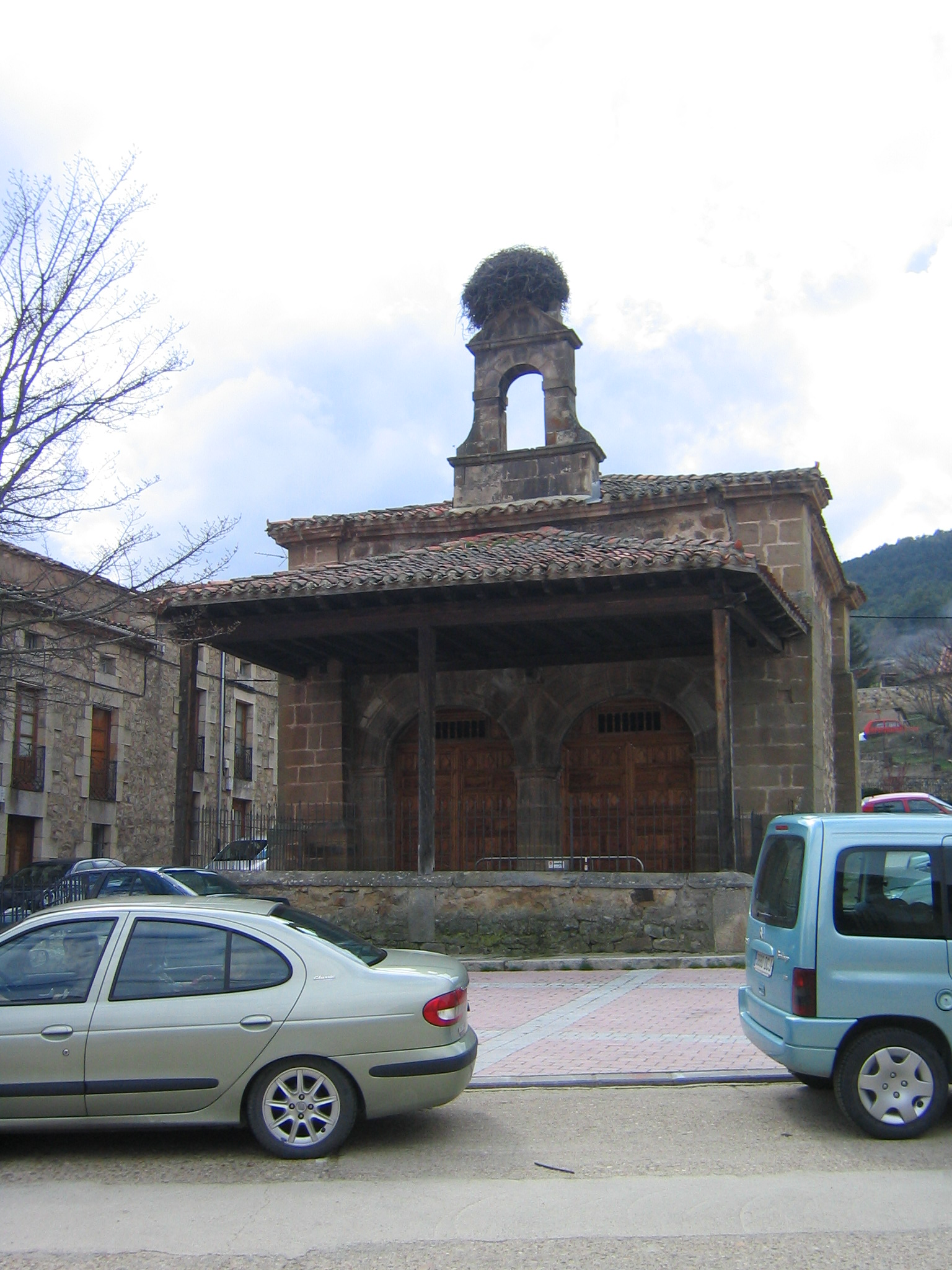 Ermita de la Soledad en Vinuesa, Soria (Castilla León) (España).